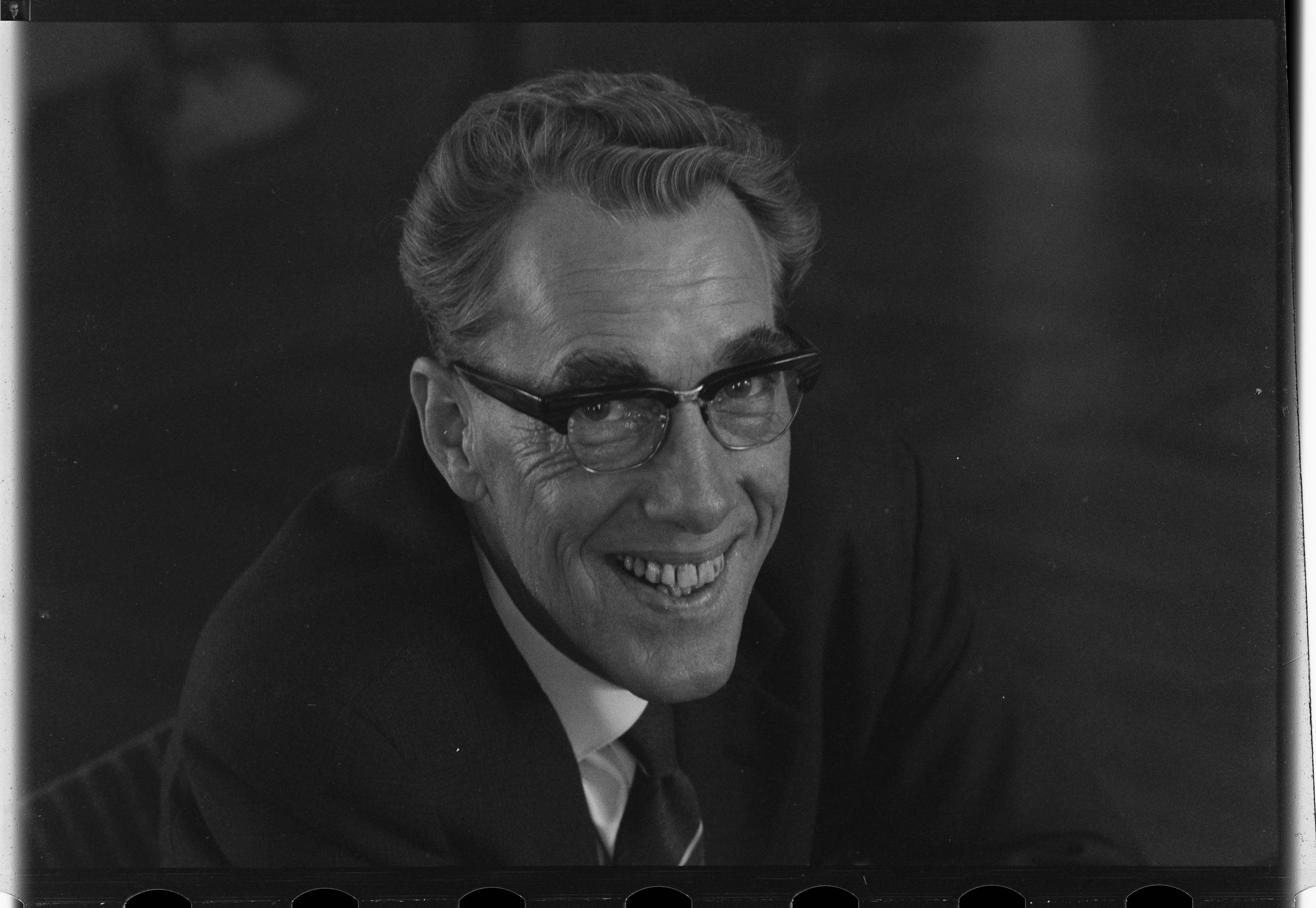 Bildet er hentet fra Arkivverket. Regjeringen Lyngs siste dag, fra debatten i Stortinget Arkivinstitusjon : Riksarkivet Arkivnavn : Billedbladet NÅ Sted : Norge, Oslo, Oslo, Stortinget Emneord: Regjeringer, Lyng Avbildet